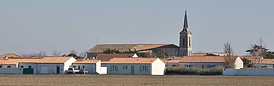 Le village de Saint-Clément-des-Baleines sur l'Île de Ré Photo issue de ma banque d'images personnelle : Pep.per 15 mars 2006 à 22:45 (CET)